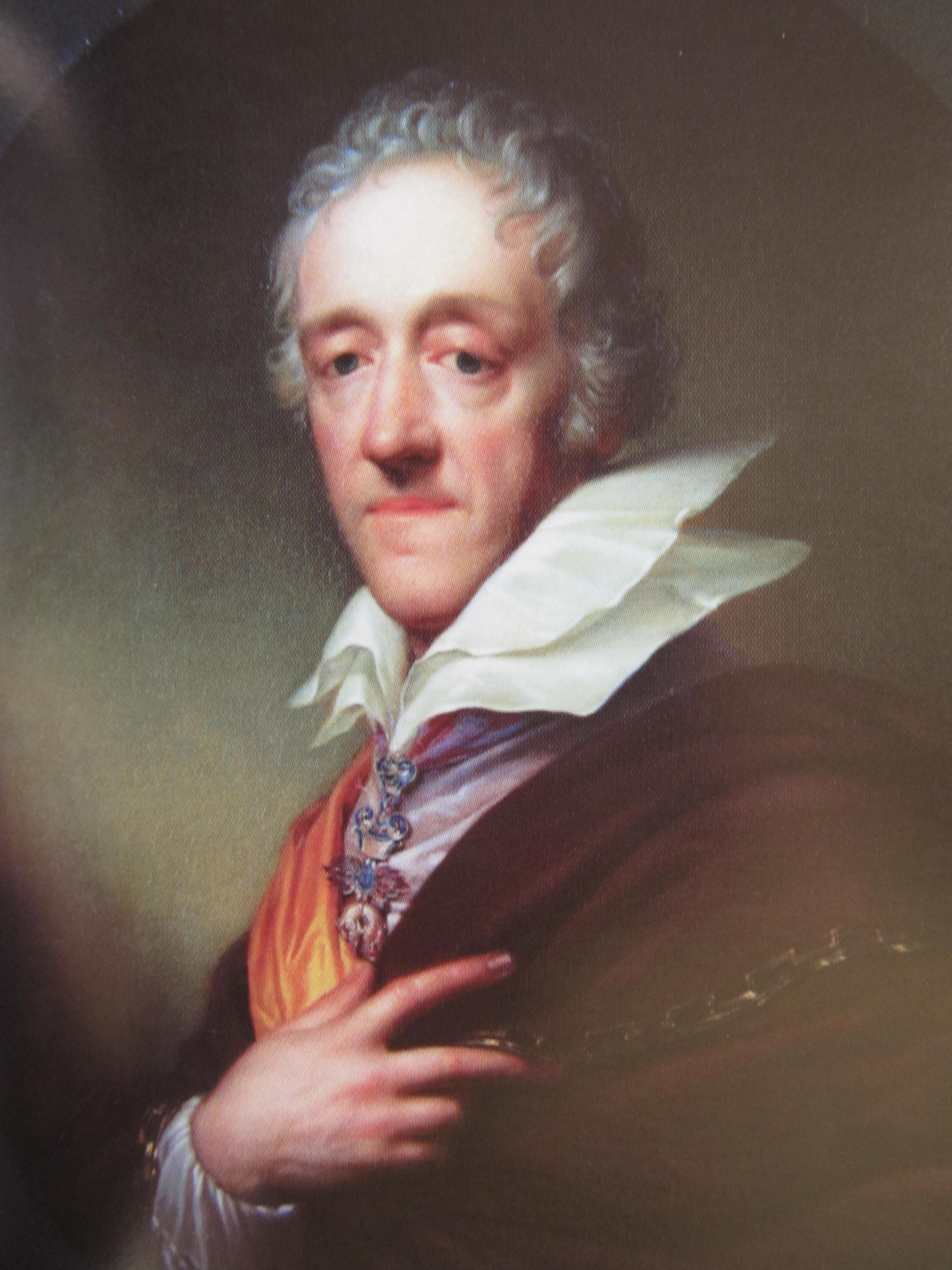 Jan Rudolf hrabě Černín z Chudenic (1757-1845)